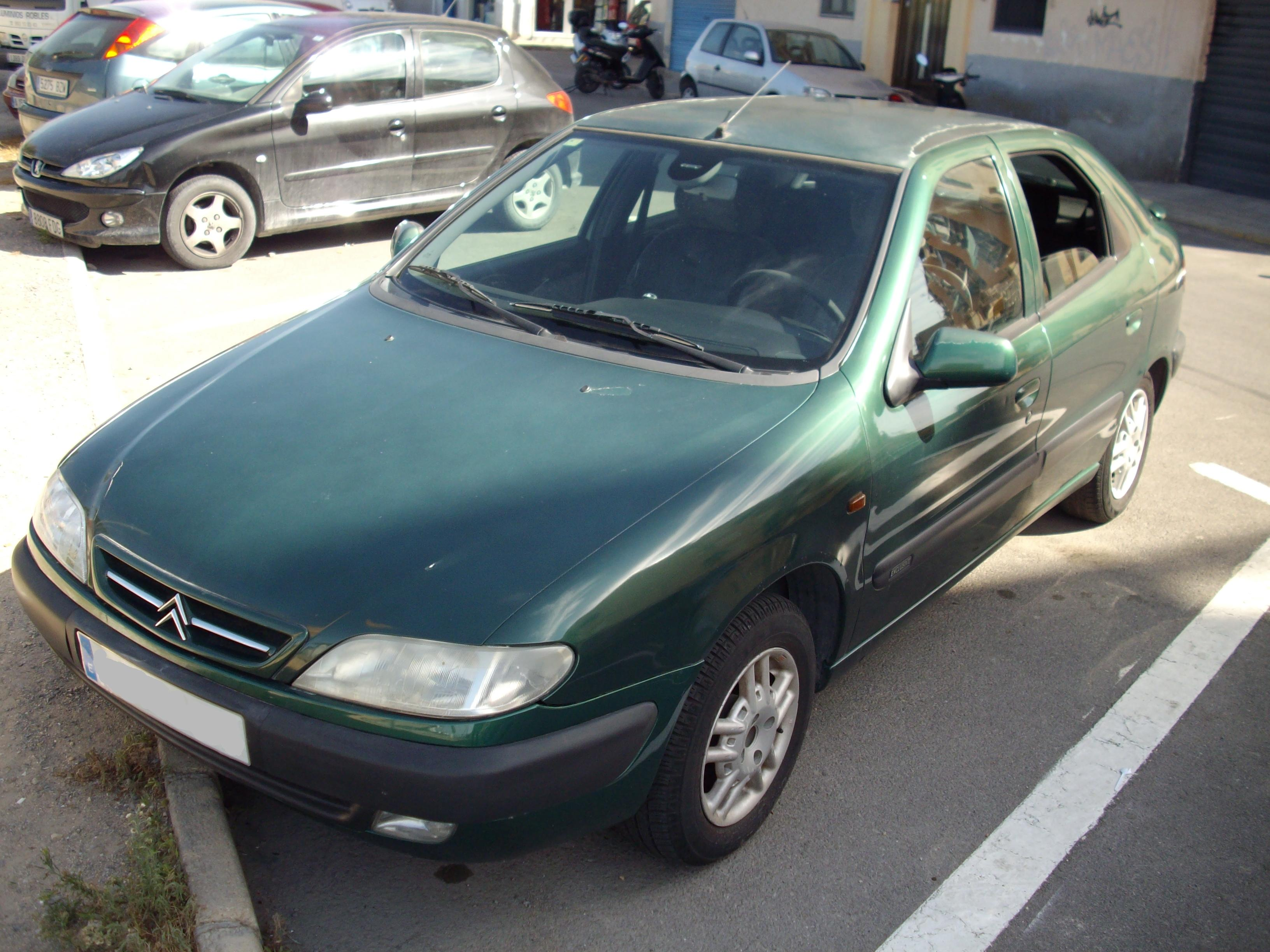 citroen xsara de 1998